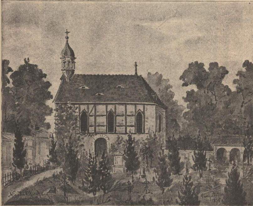 Beiträge zur Sächs. Volks- und Heimatkunde. Mit Zeichnungen von Professor O. Seyffert und Maler F. Rowland.